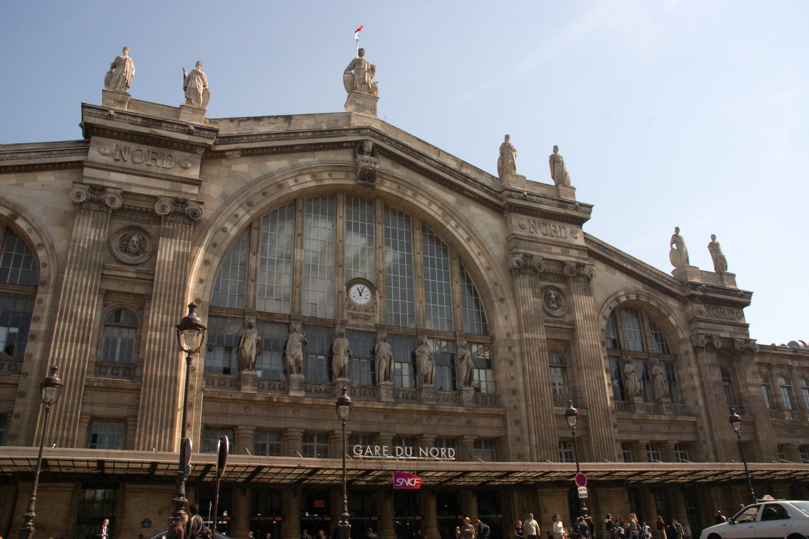 Gare du Nord, Paris, France